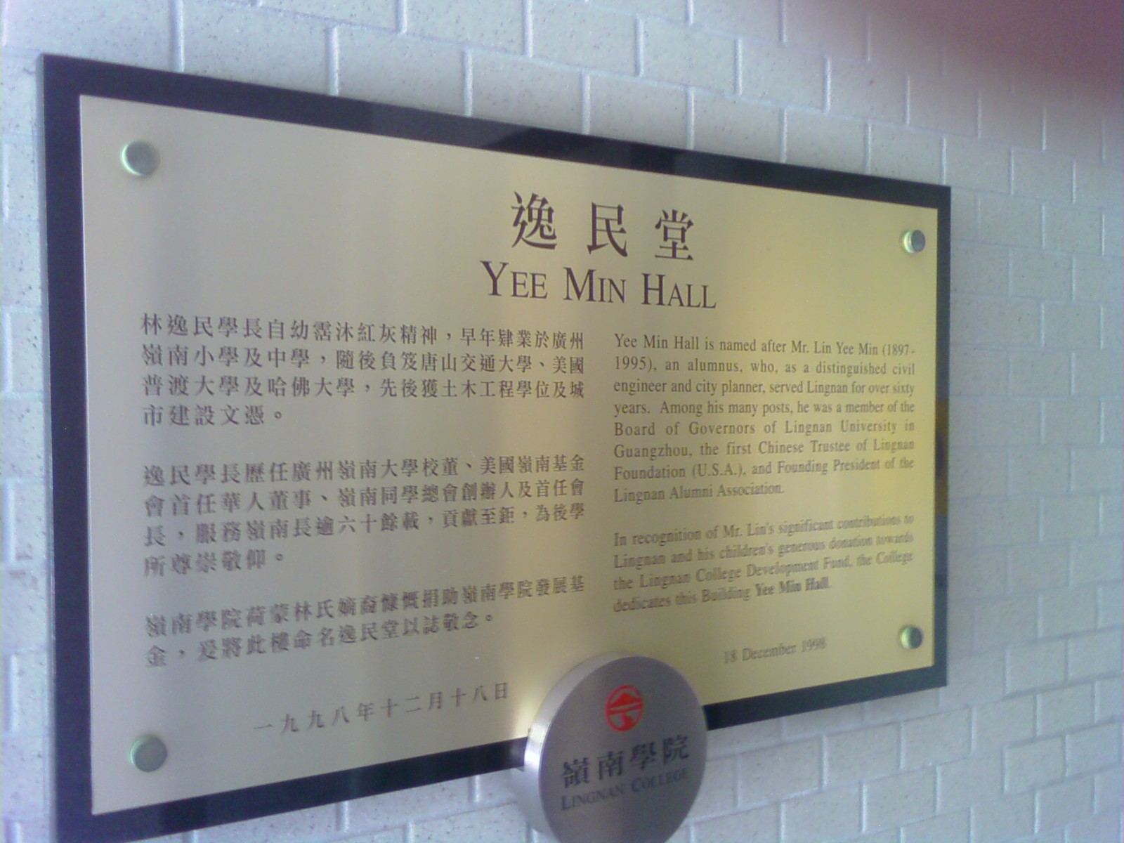 Yee Min Hall